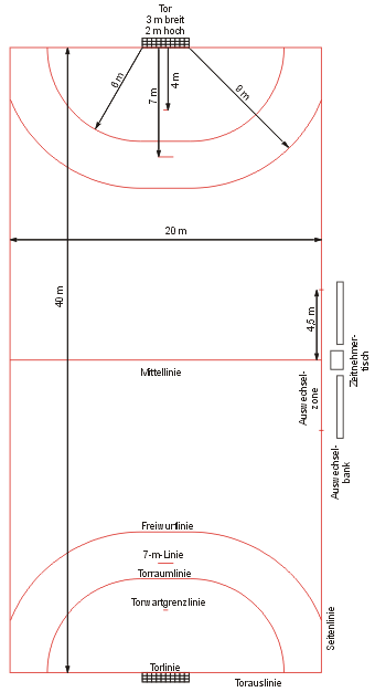 Data from de: Beschreibung: Handball-Spielfläche Quelle: Selbst gezeichnet mit CorelDraw am 11.09.2004 Autor: Stephan Brunker Lizenz: GNU FDL